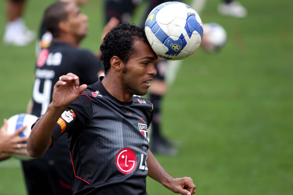 Jogador Richarlyson em 2009.